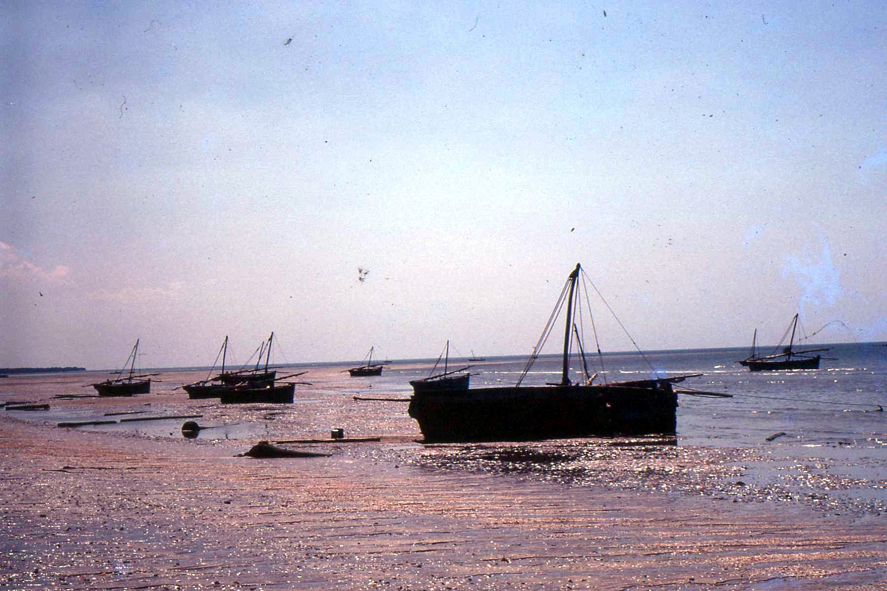 Bagamoyo